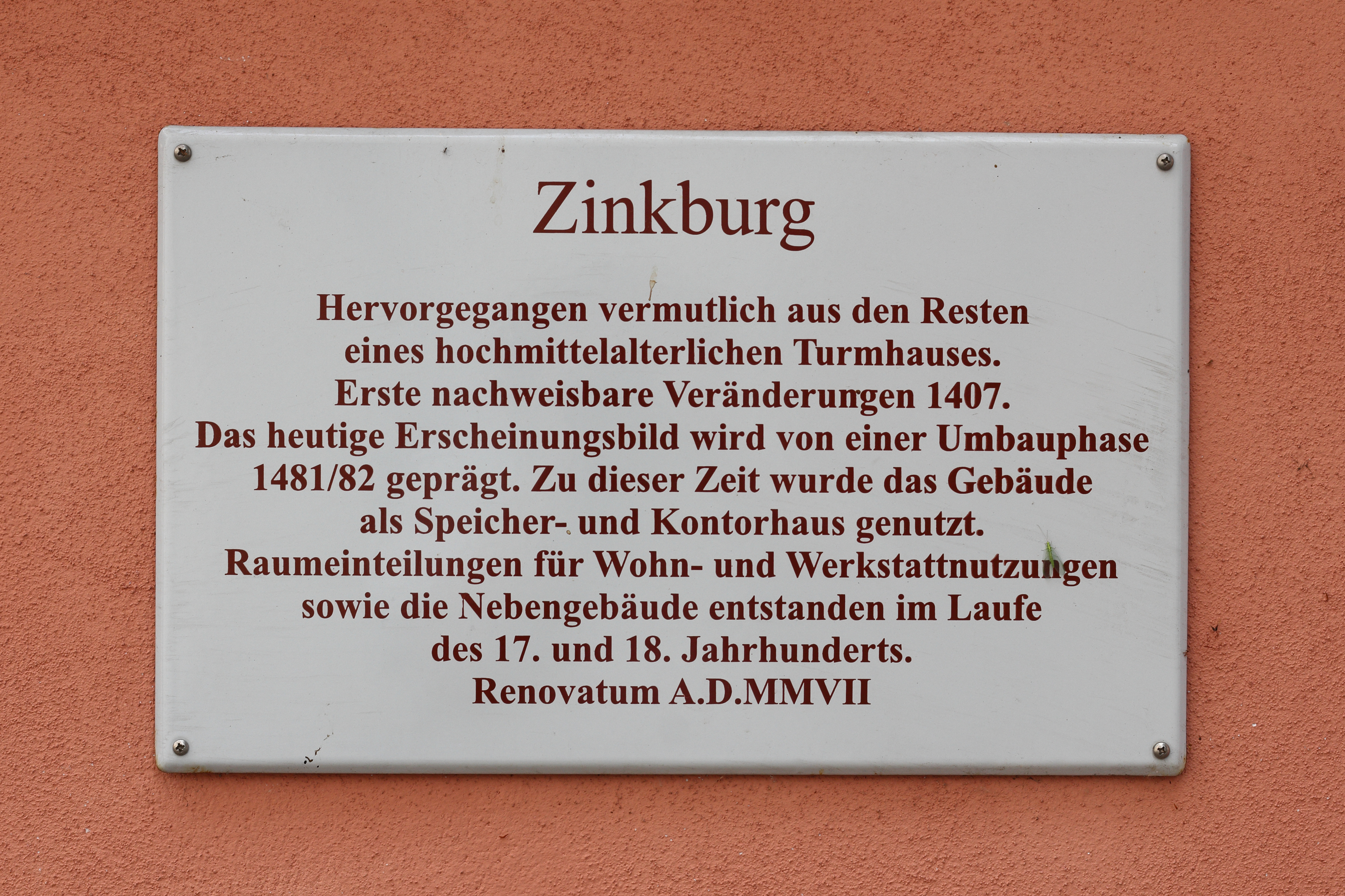 Schwabach - Boxlohe 18 - Detail (Sogenannte Zinkburg. Um Innenhof gruppiertes Ackerbürger- und Klingenschmied-Anwesen, Wohnhaus mit Schopfwalmdach, wohl 17. Jahrhundert.)